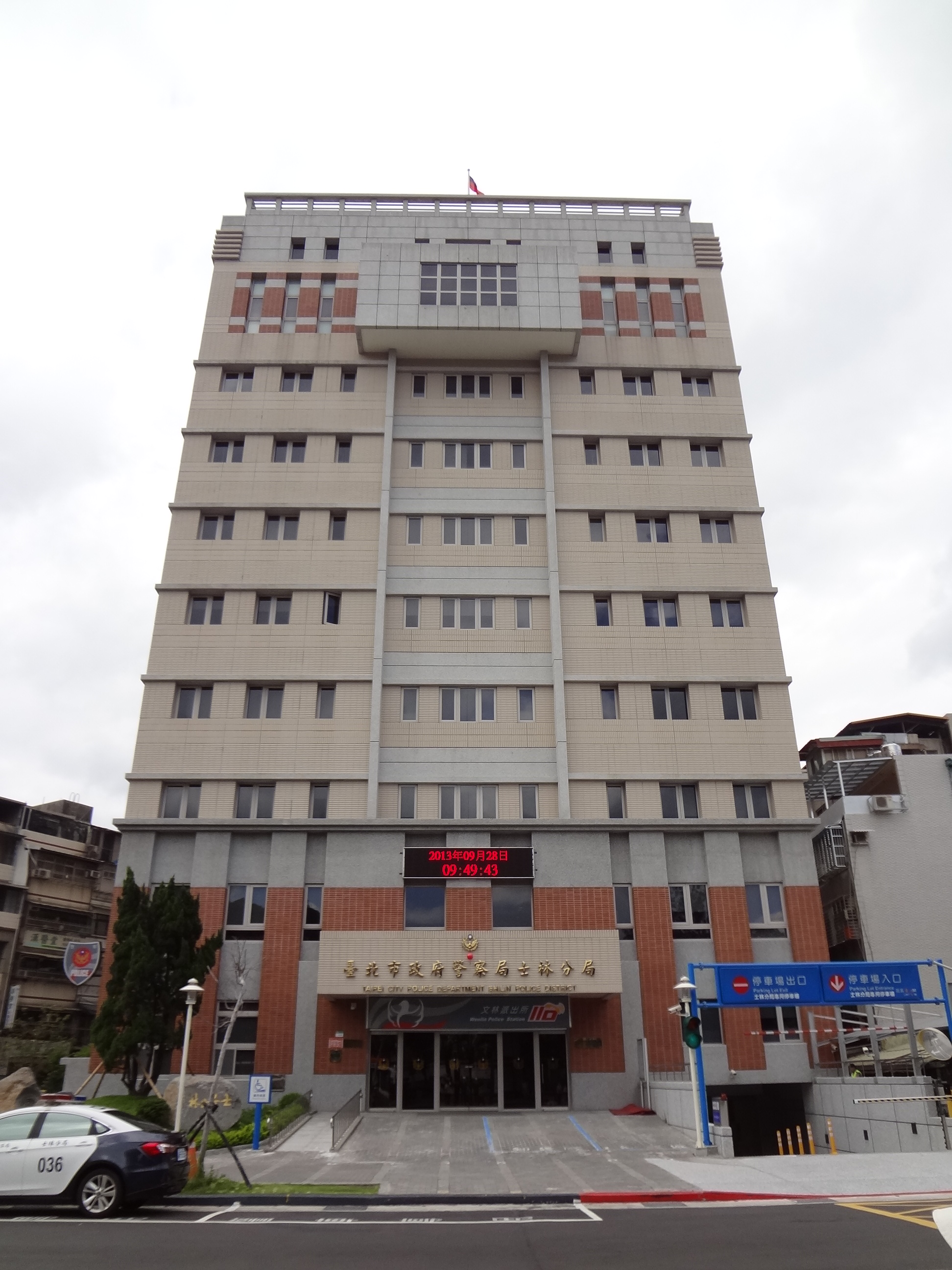 臺北市政府警察局士林分局，位於臺北市士林區文林路235號。